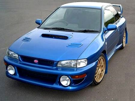 インプレッサ22B STIバージョン 2004年 投稿者撮影